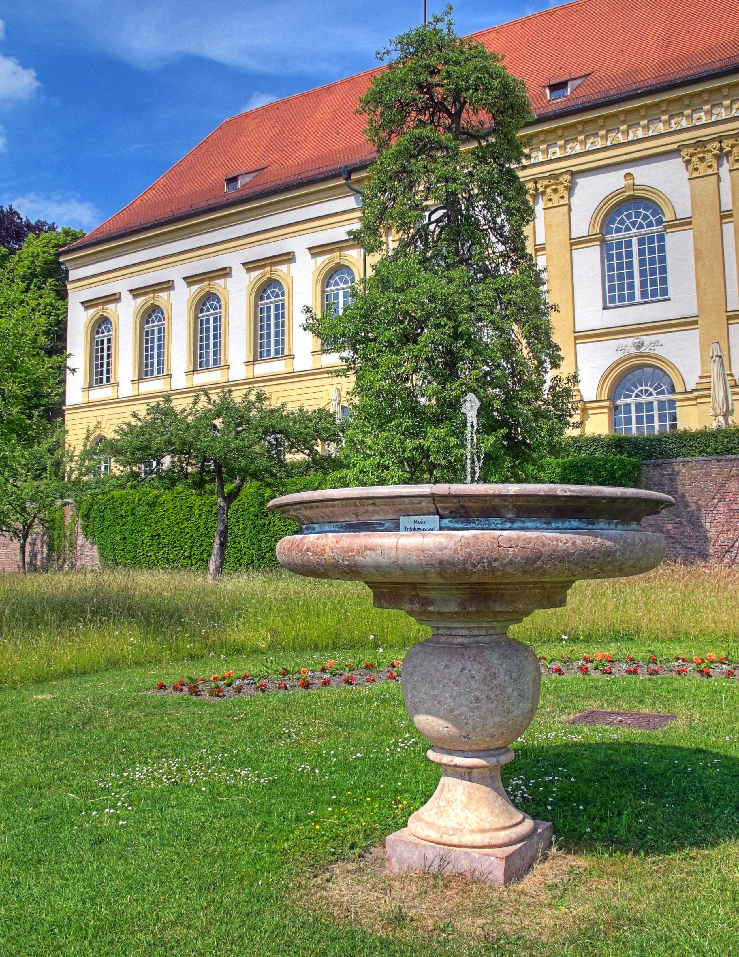 Deutschland, Bayern, Dachau, Schloss, Gartenseite Brunnen, HDR-Image